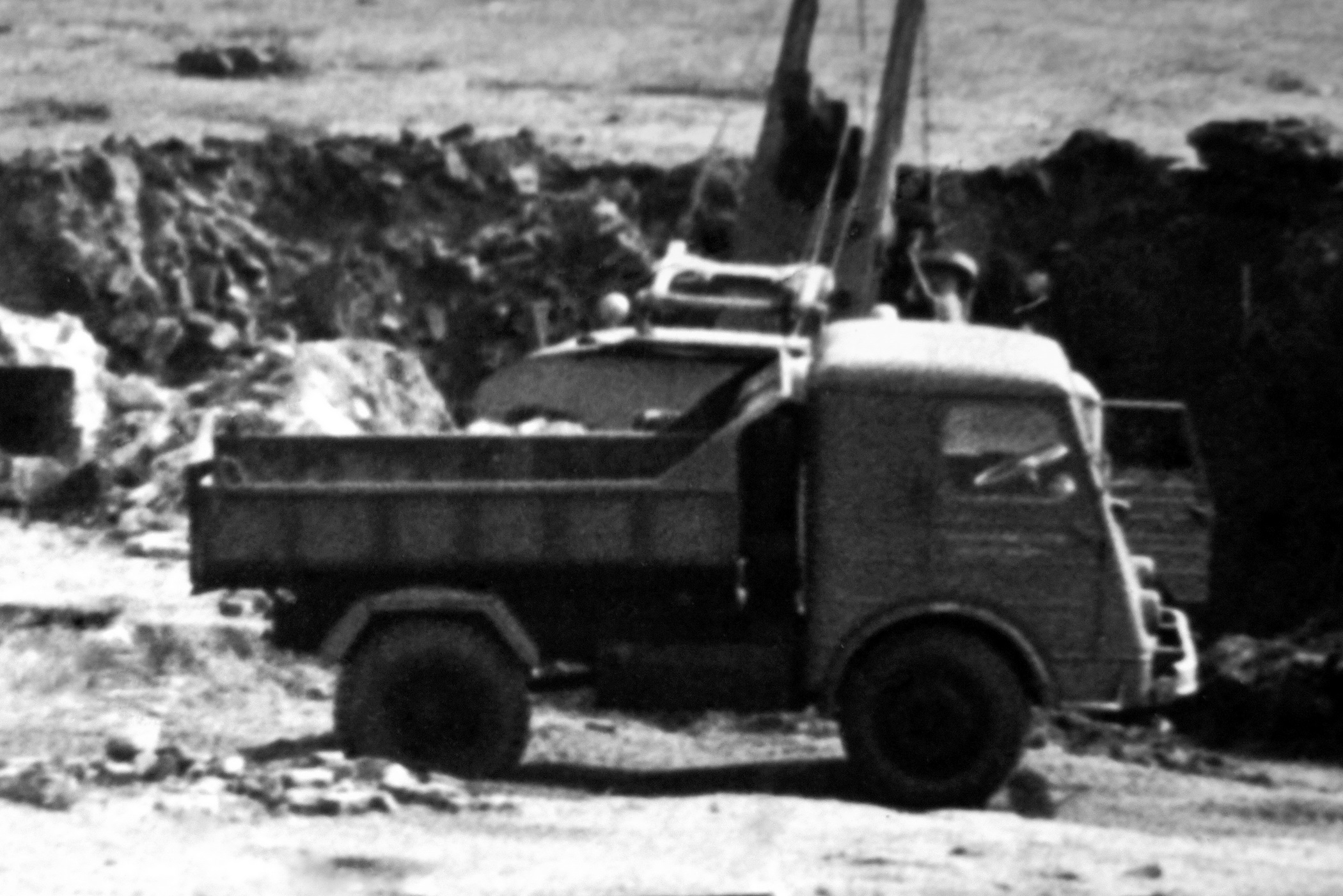 Star W25 - wywrotka ze skrzynią ładunkową przechylaną do tyłu. W latach 60 i wczesnych 70, podstawowy samochód na placach budów w PRL-u.